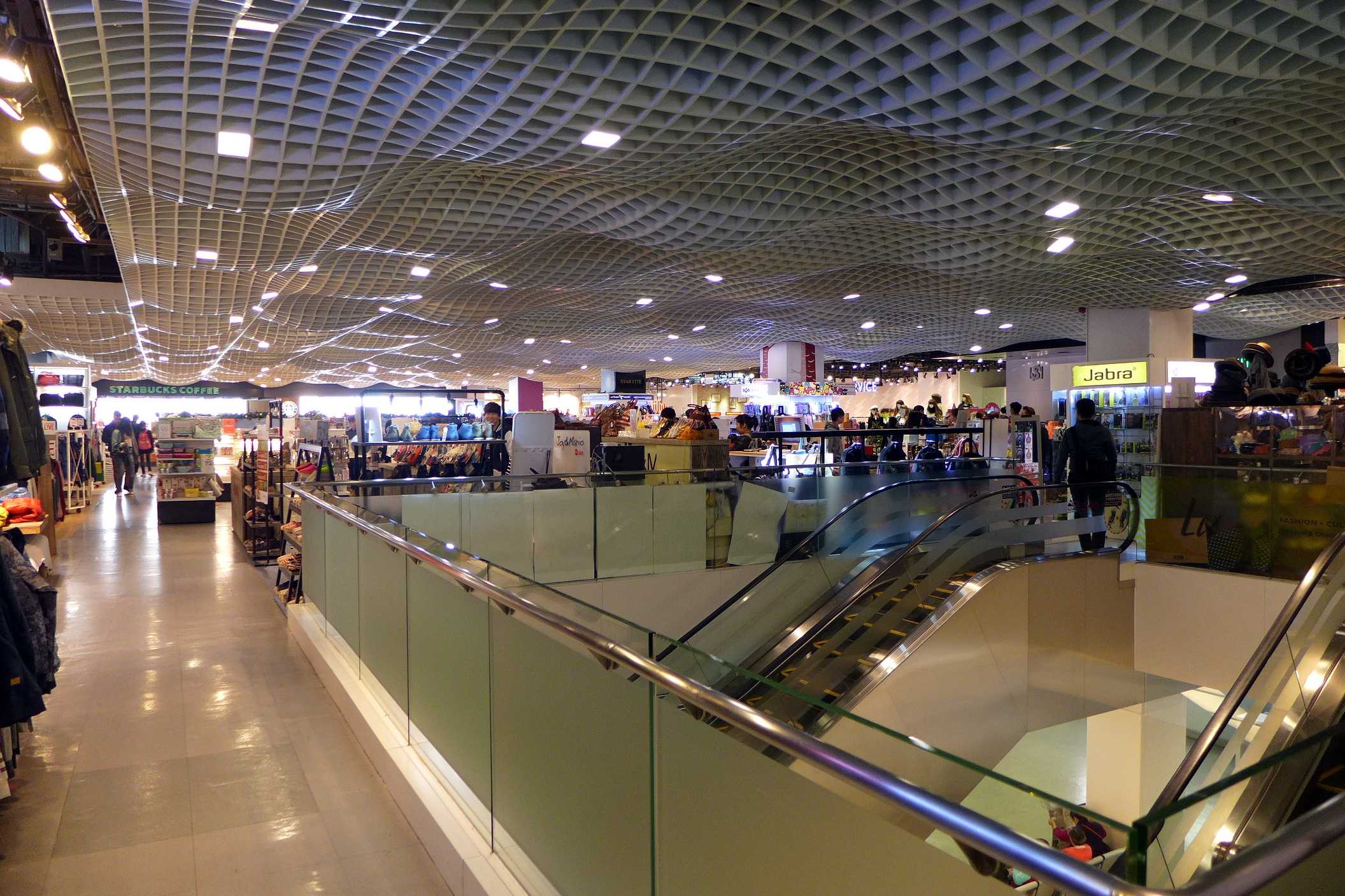 Ocean Terminal LCX Xplus